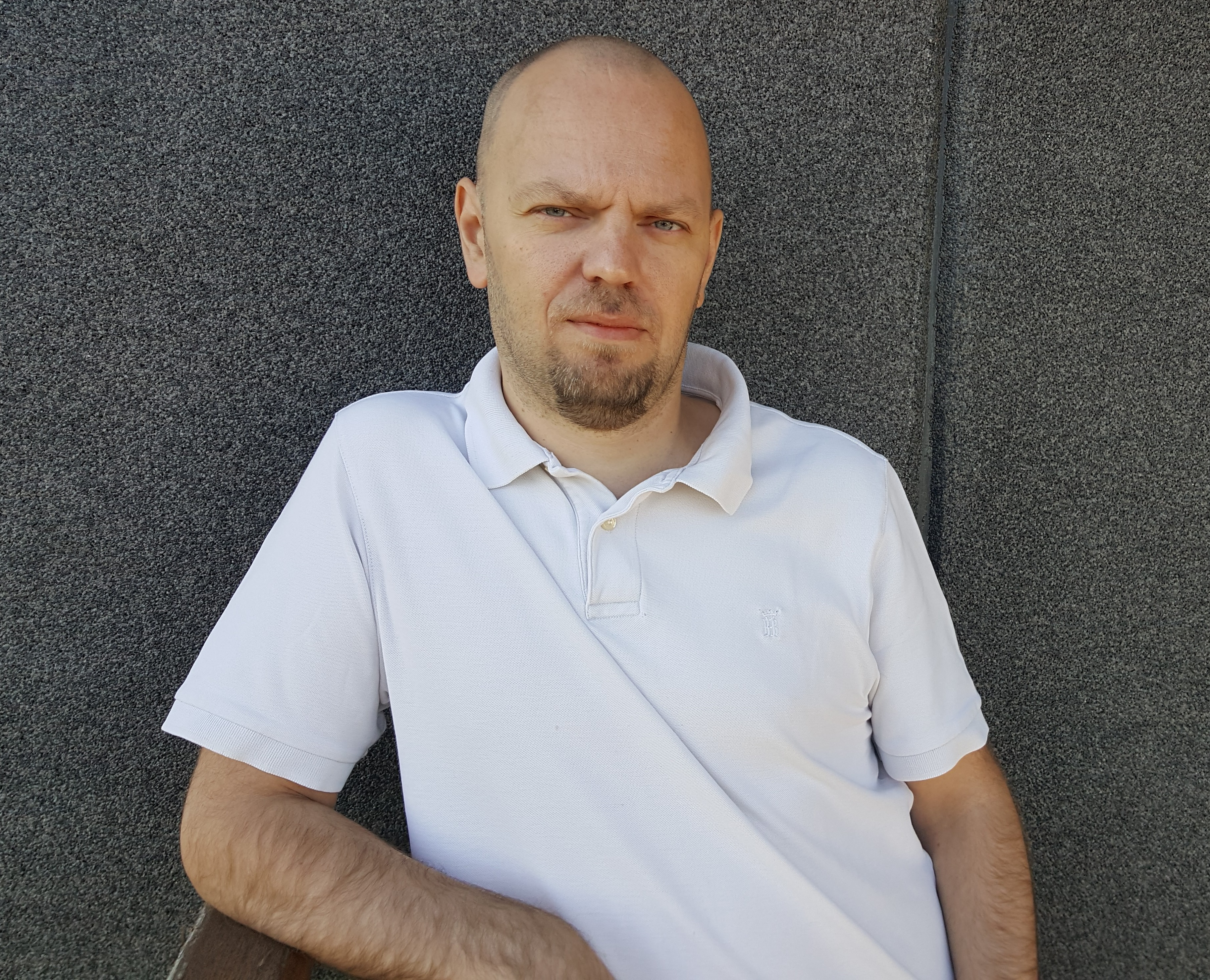 Tarmo Tulva